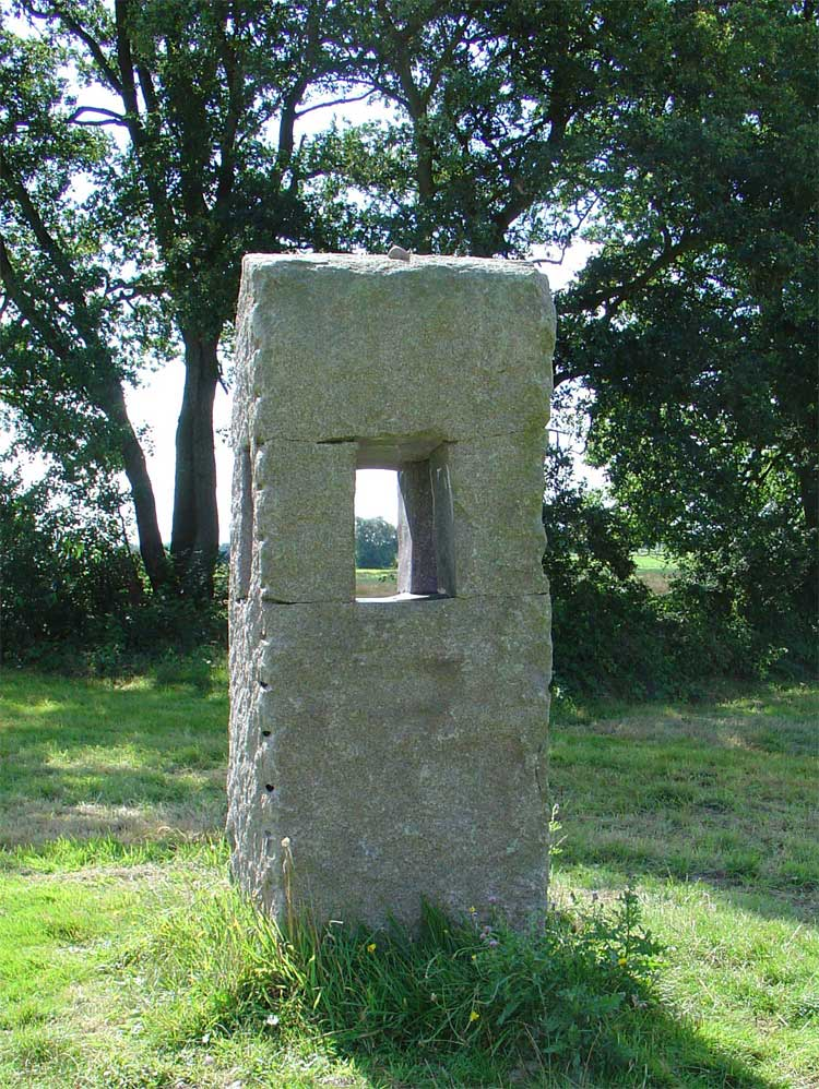 "Monument voor Harry de Vroome" door Bastiaan de Groot - fietspad langs het Balloërveld